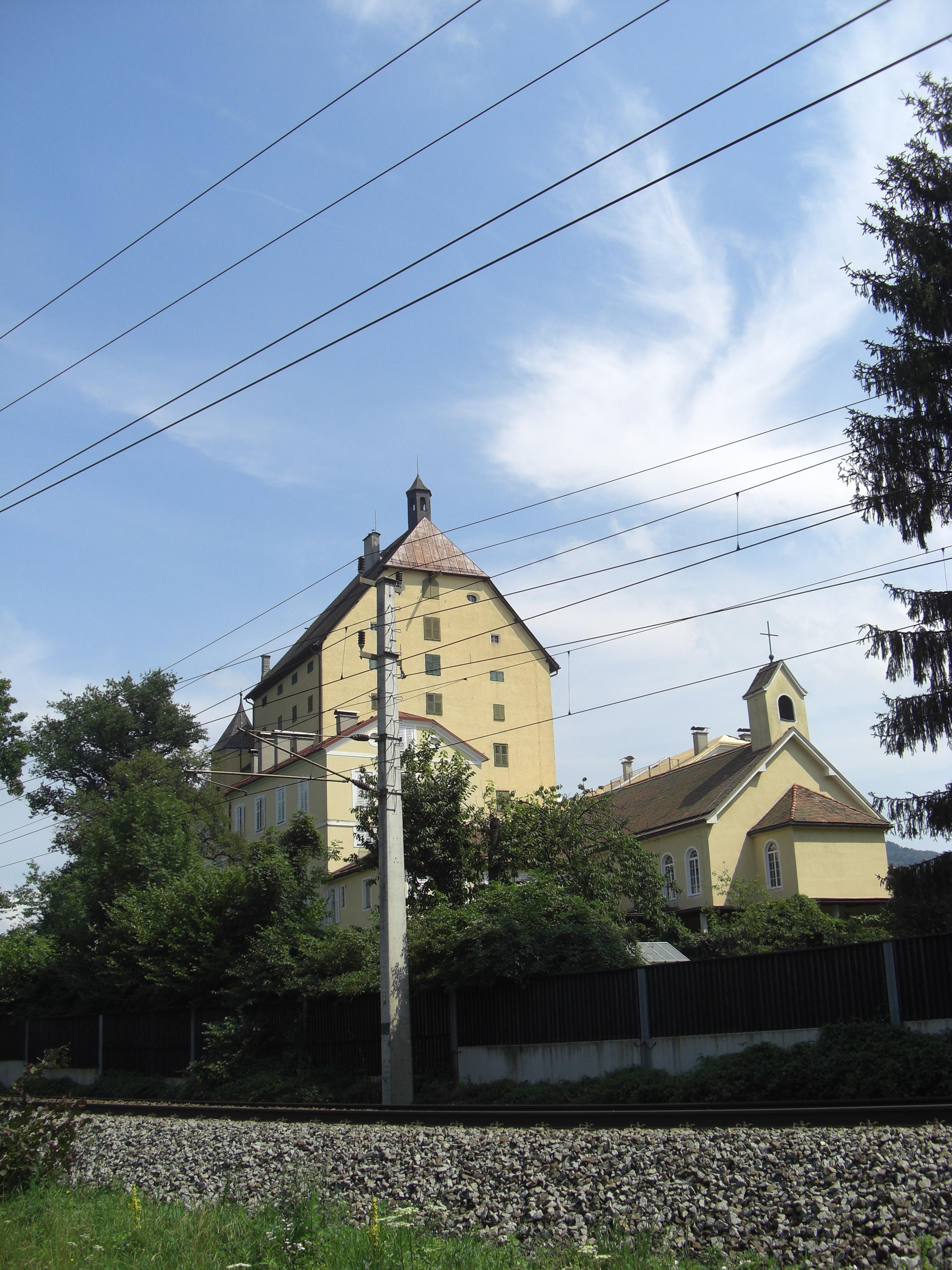 Schloss Goldenstein vom Süden